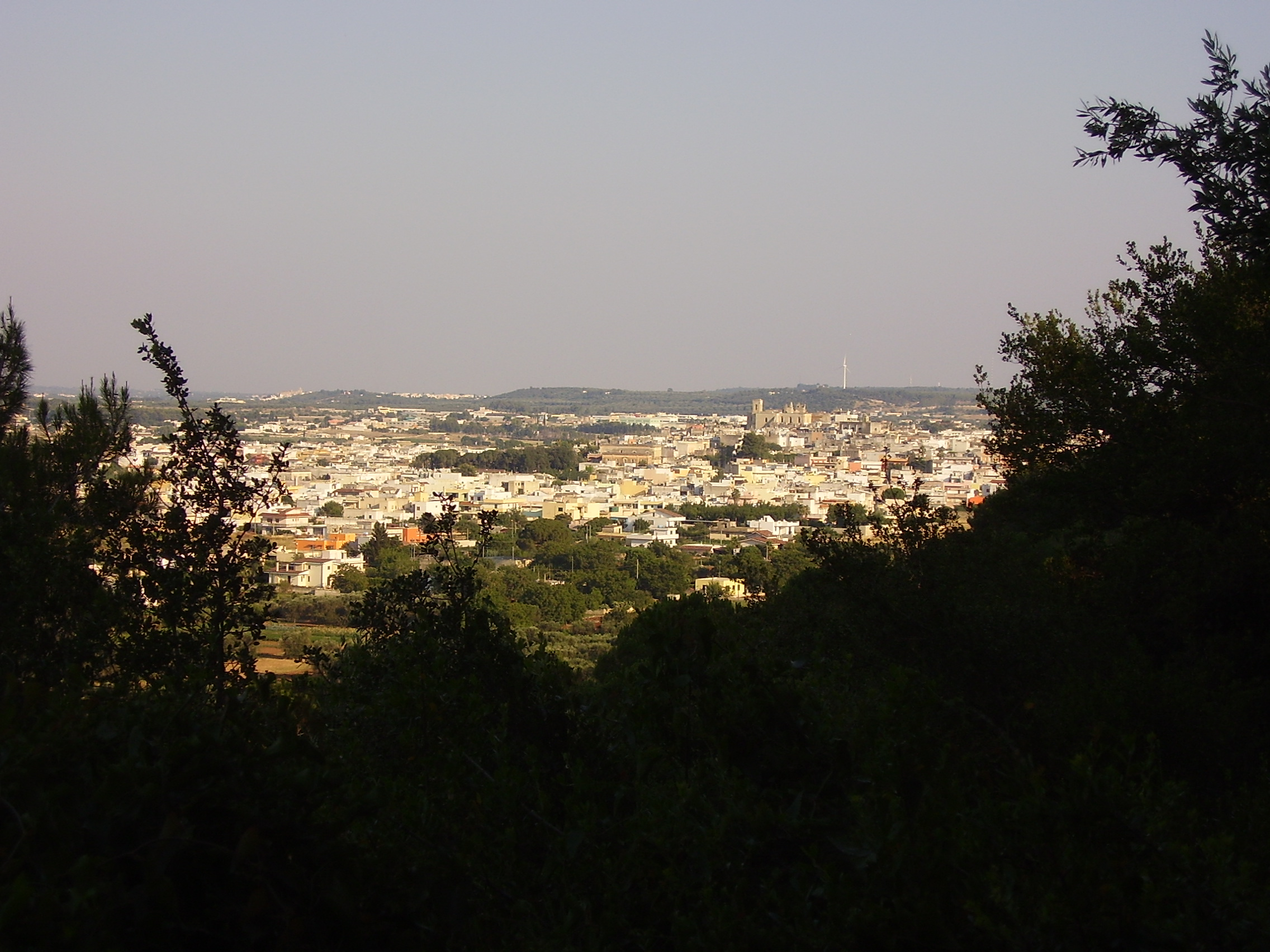 Panorama Ruffano